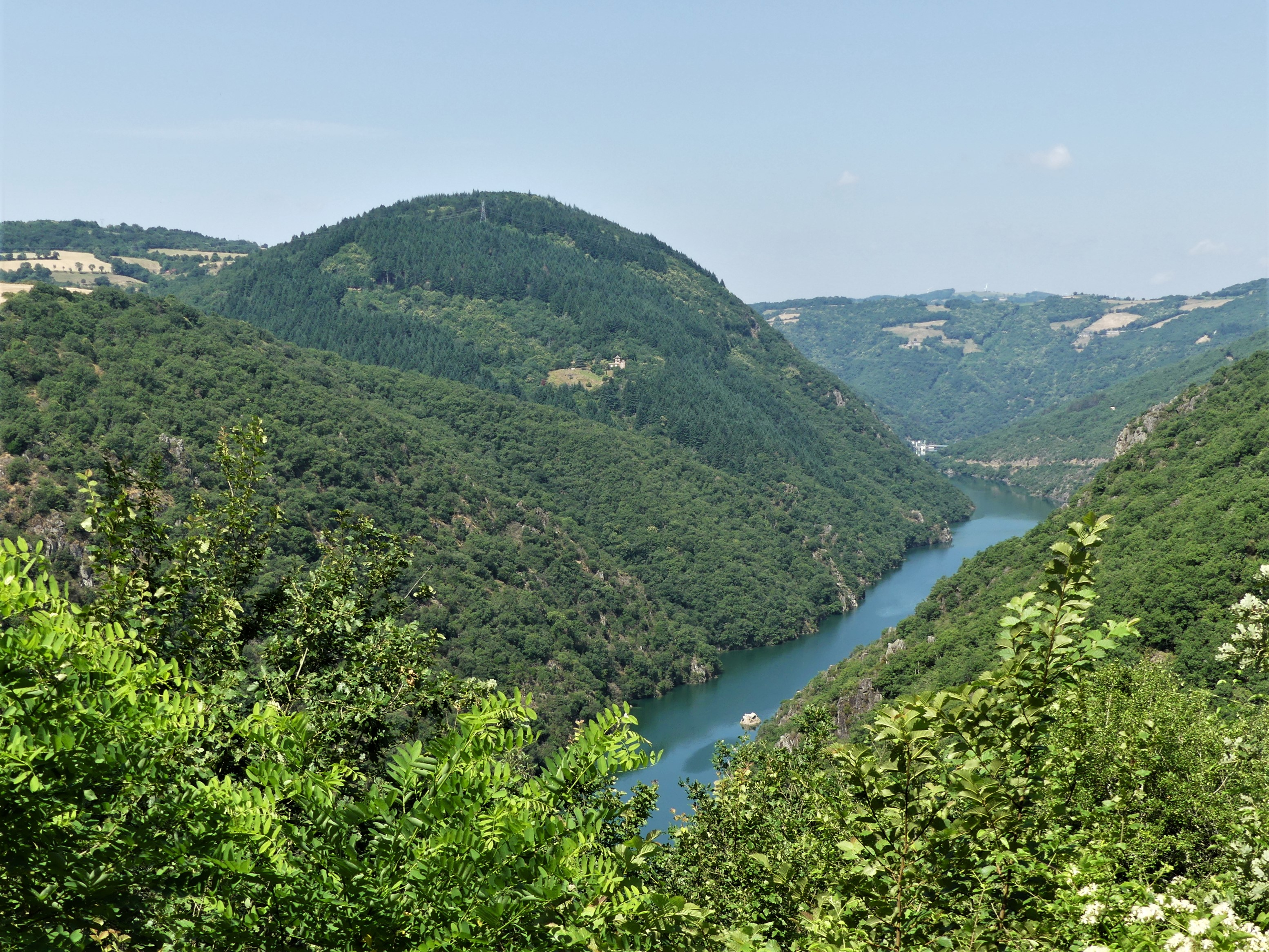 Vue prise depuis le belvédère de Puech Gazal à Saint-Rome-de-Tarn, le long de la route départementale 31 : la retenue sur le Tarn du barrage de Pinet (que l'on devine tout au fond) sépare les communes de Saint-Victor-et-Melvieu (à gauche avec le mont Redon) et de Viala-du-Tarn (à droite) ; Aveyron, France.